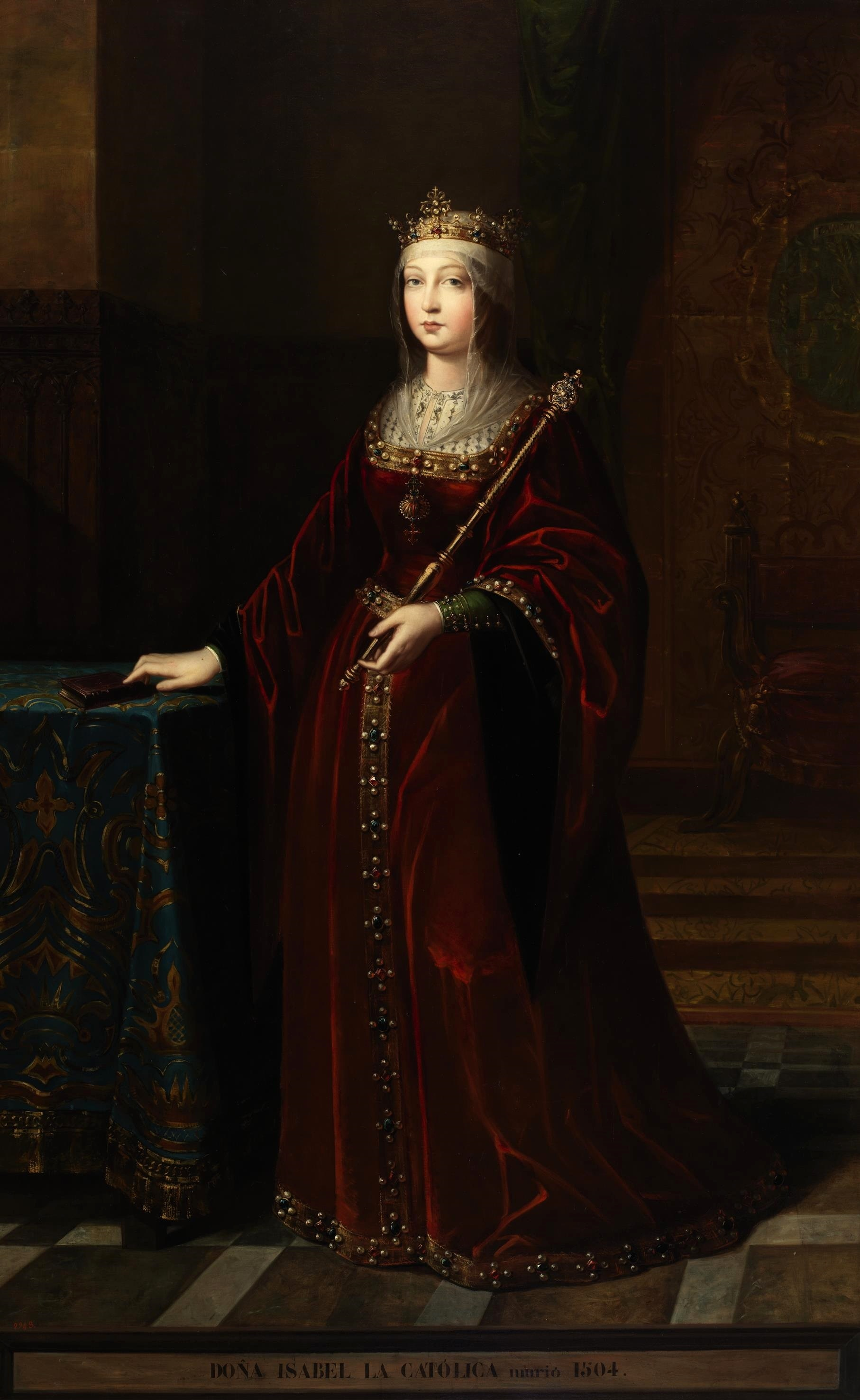 Retrato de la reina Isabel I de Castilla (1451-1504), hija del rey Juan II de Castilla y sucesora de su hermanastro, el rey Enrique IV de Castilla.